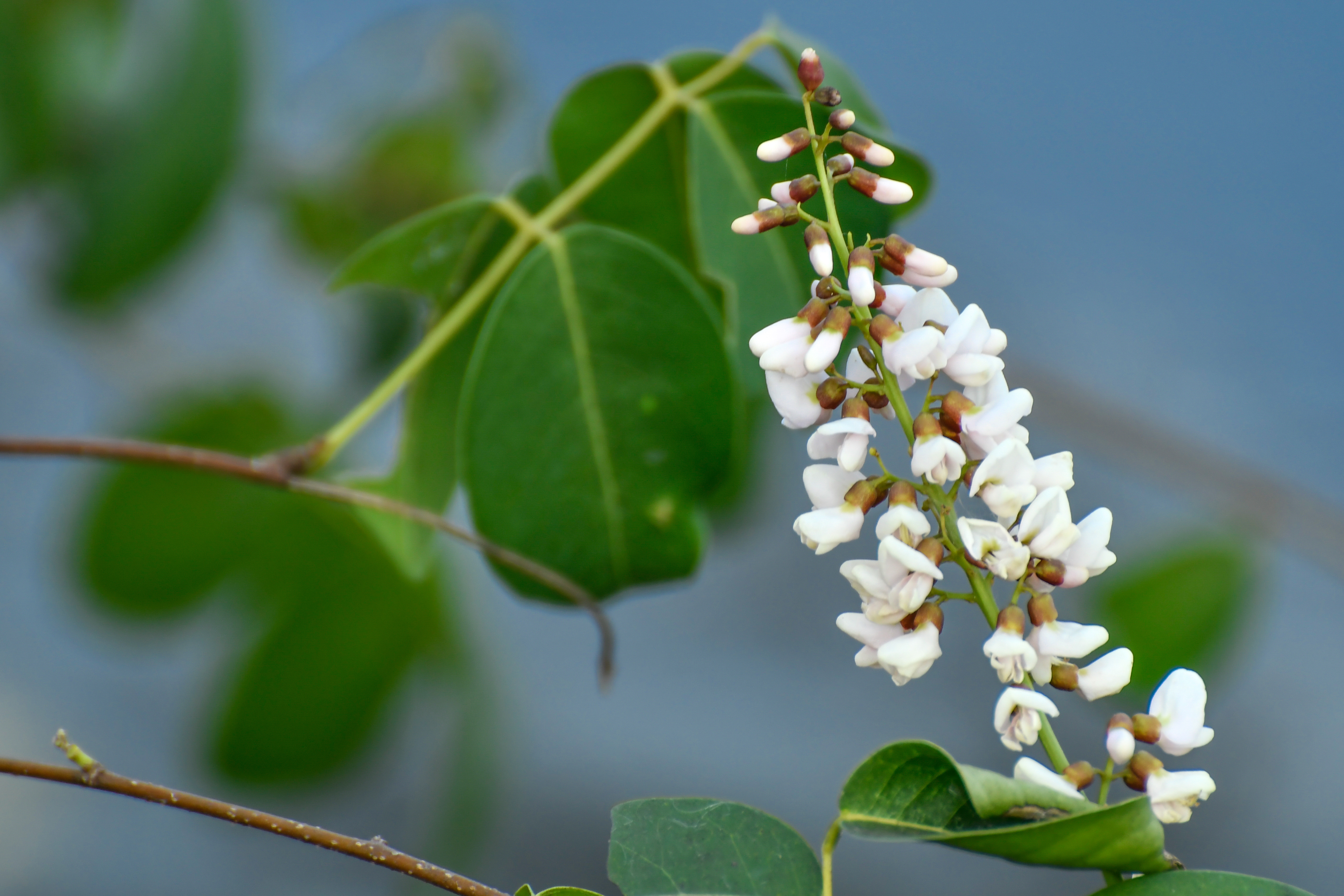 പൊന്നാംവള്ളി